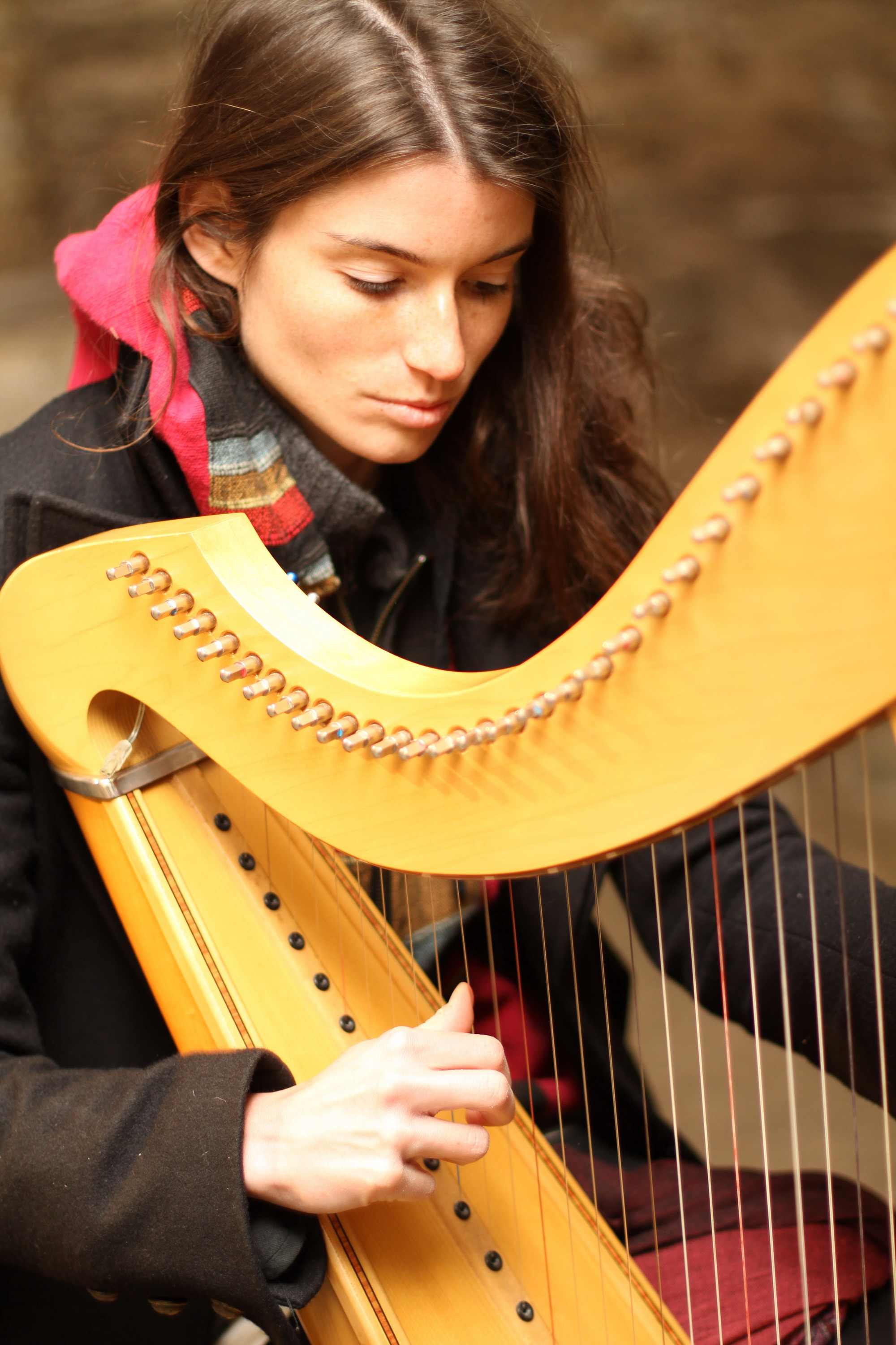 Anne-Gaëlle Cuif, impegnata nelle session di registrazione di "Personal Waves"